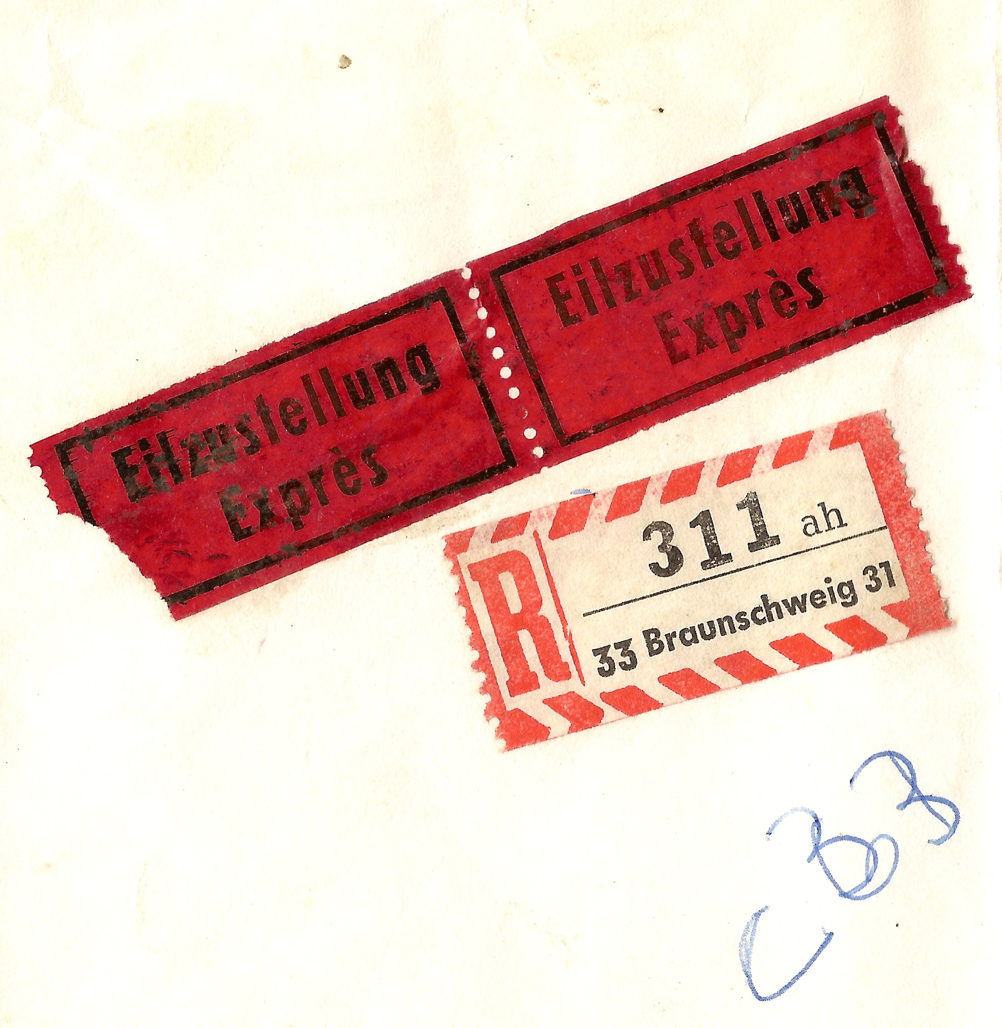 Aufkleber „Eilzustellung Exprès“ und „R“ (Einschreiben), Deutsche Bundespost; handschriftliche Abkürzung „CBB“ hier unbekannt